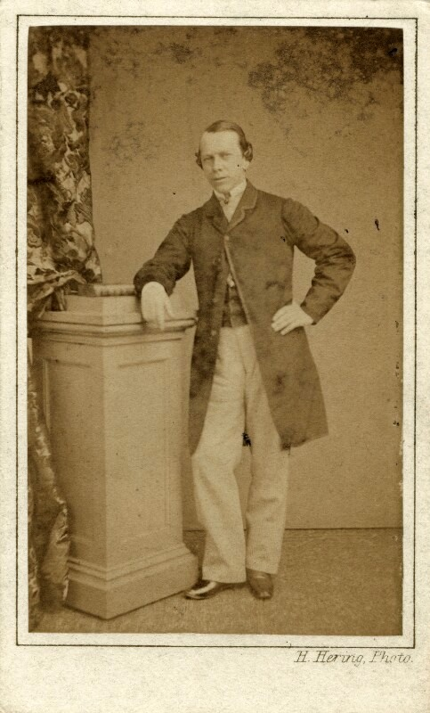 Photograph by Henry Hering